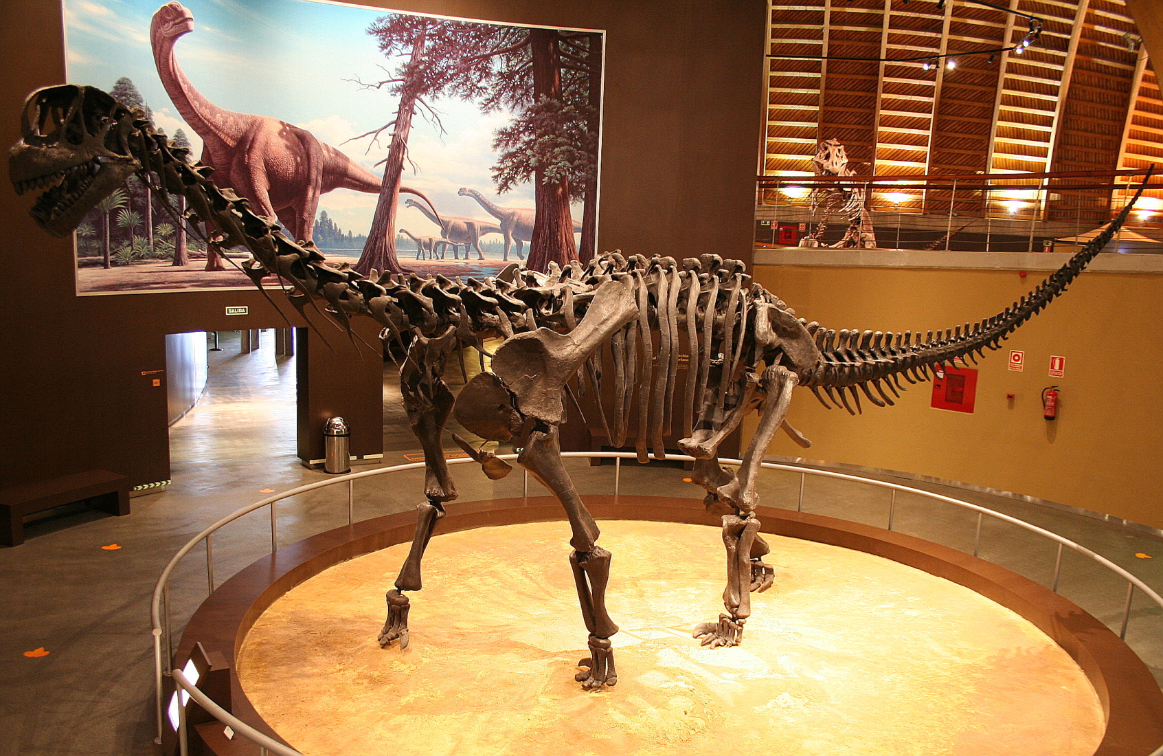 Camarasaurus reconstruido en el MUJA, Asturias, España.